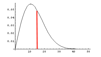 Průběh hustot výskytu rychlostí větru ve Weibullově rozdělení s tvarovým koeficientem 2 (Rayleighovo rozložení) pro střední rychlost 15 m/s